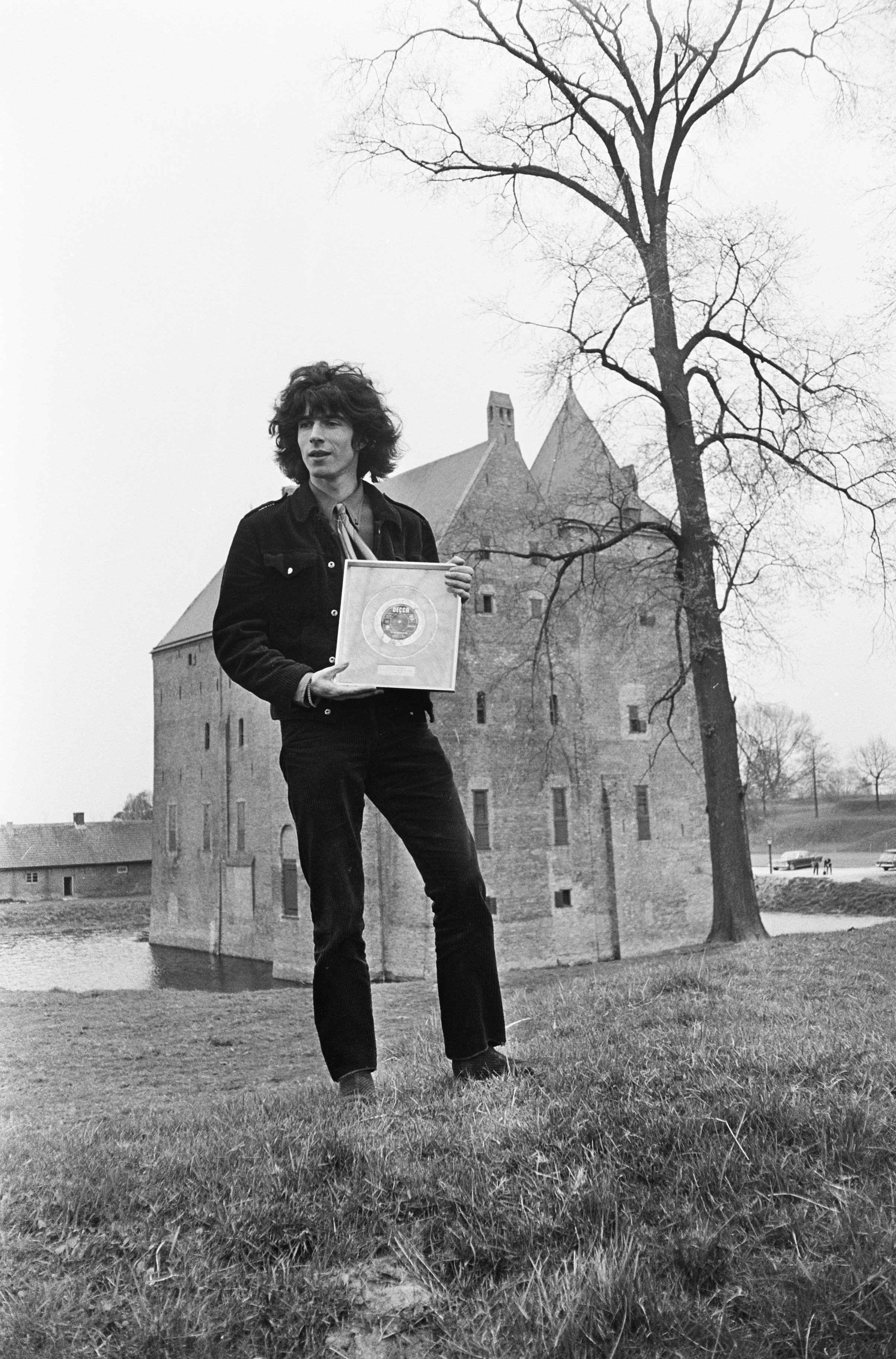 Collectie / Archief : Fotocollectie Anefo Reportage / Serie : [ onbekend ] Beschrijving : Boudewijn de Groot kreeg gouden plaat voor lied Land van Maas en Waal , hier bij slot Loevenstein Datum : 19 april 1967 Trefwoorden : onderscheidingen, zangers Persoonsnaam : Groot, Boudewijn de Fotograaf : Merk, Ben / Anefo Auteursrechthebbende : Nationaal Archief Materiaalsoort : Negatief (zwart/wit) Nummer archiefinventaris : bekijk toegang 2.24.01.05 Bestanddeelnummer : 920-2483 Reacties Geplaatst door Flowerpowergirl op 19 maart 2016 - 16:16. Locatie: Slot Loevestein Plaats: Poederoijen, Gelderland